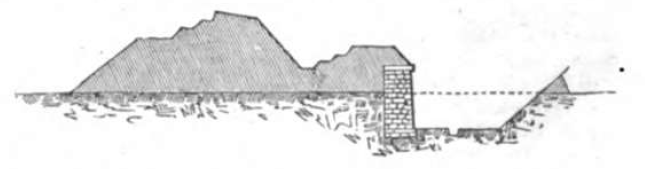 Cavalier